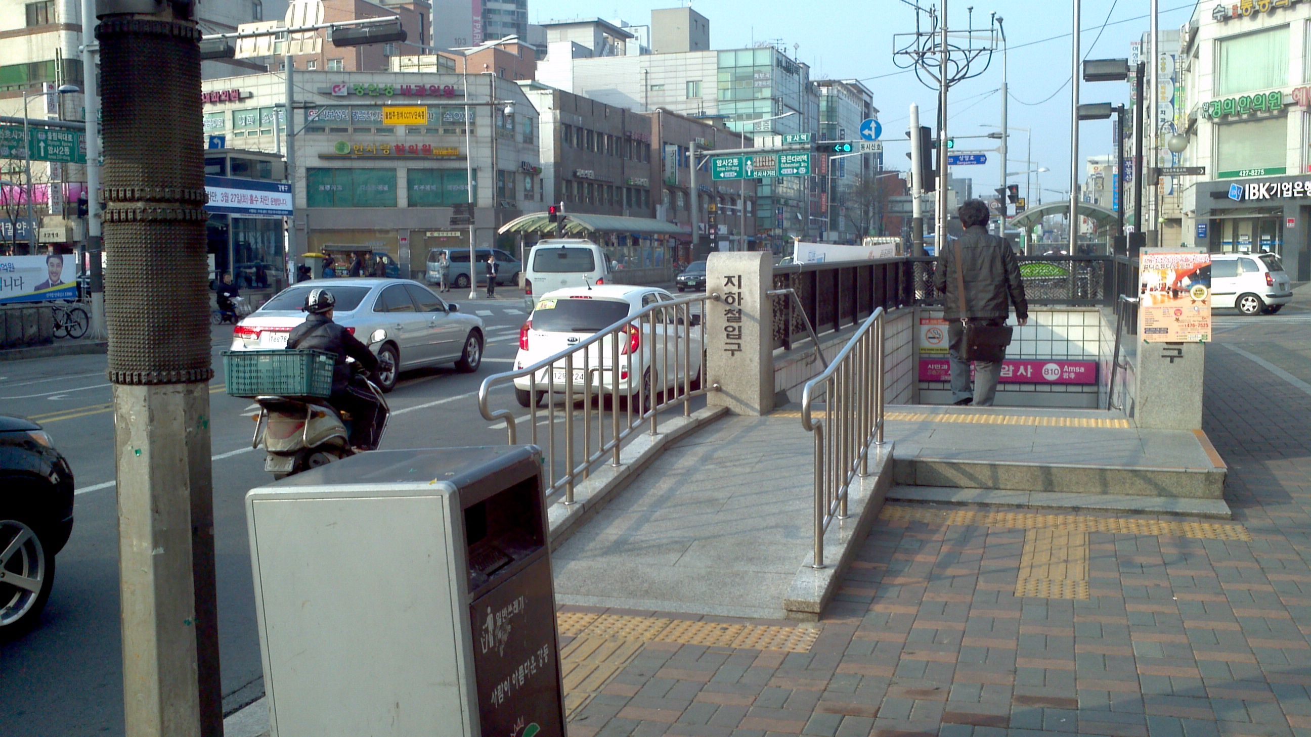 암사역 출입구들